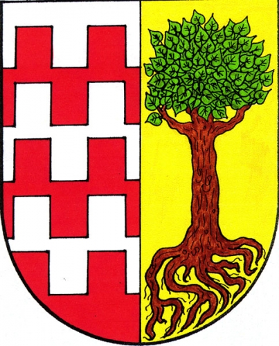 znak, Lipník, okres Třebíč